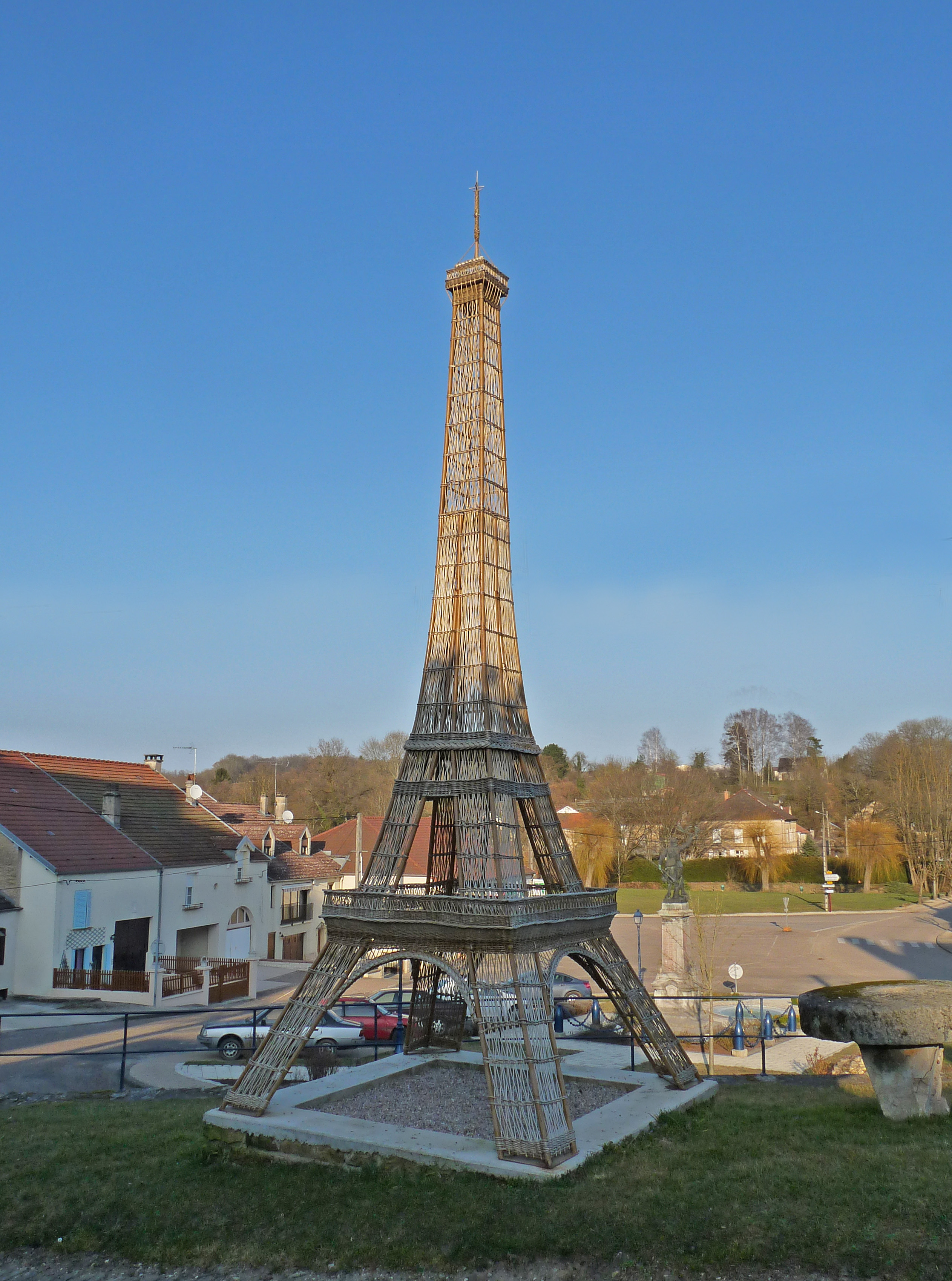 Tour Eiffel en osier à Bussières-lès-Belmont (Haute-Marne)